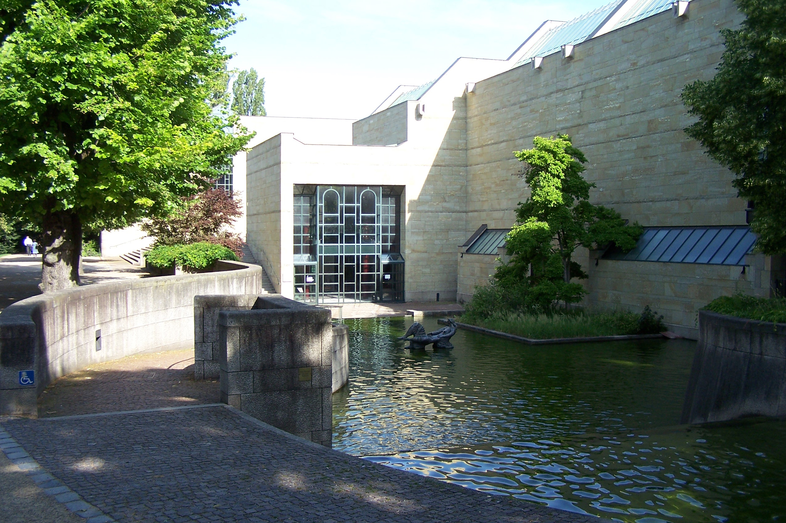 Mnichov: muzeum Neue Pinakothek